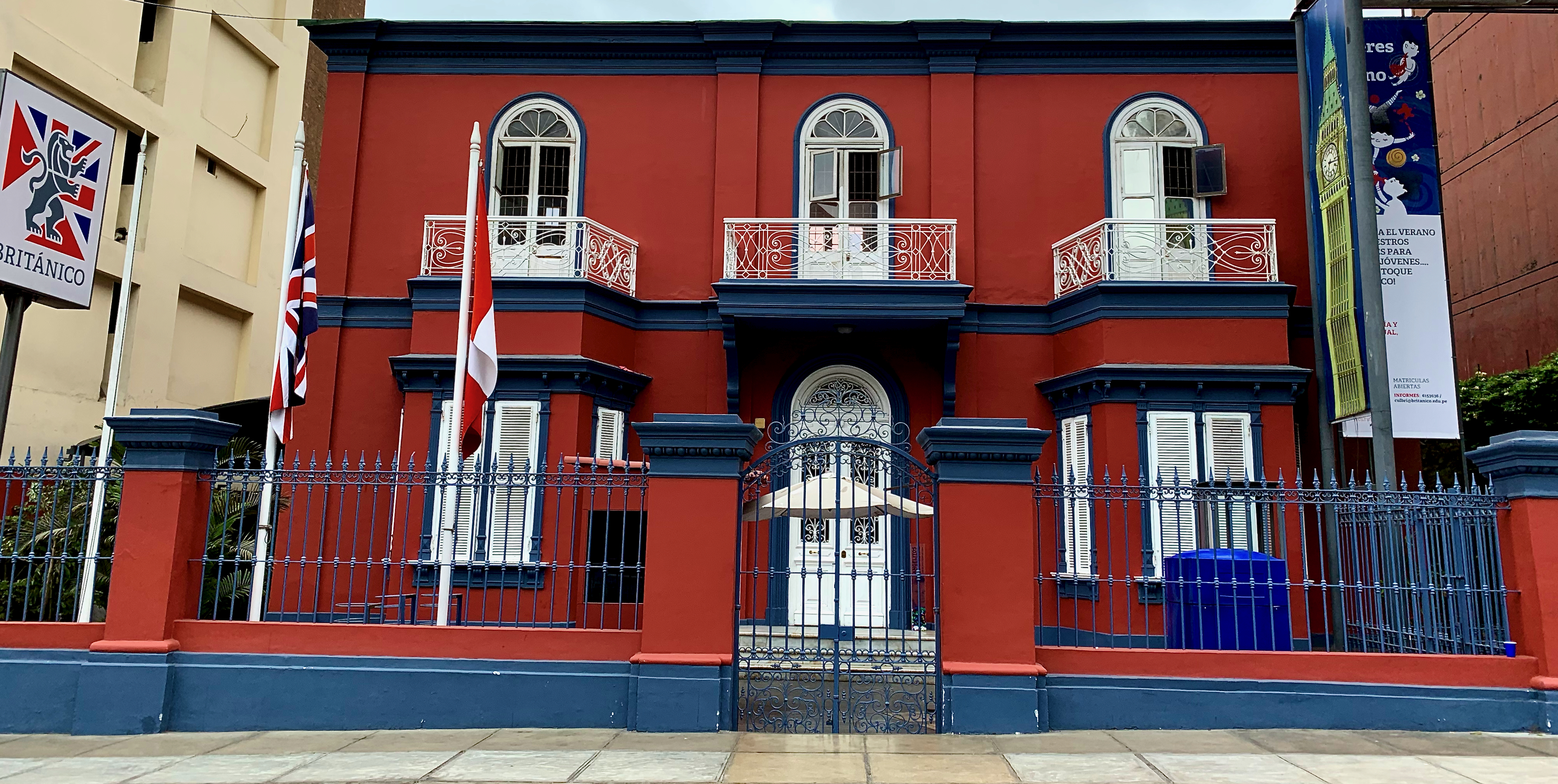 Edificio del BRITANICO